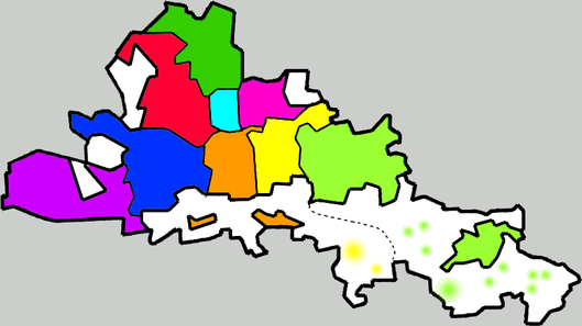 Районы Донецка: Жёлтый - Будённовский Голубой - Ворошиловский Розовый - Калининский Зелёный - Киевский Синий - Кировский Красный - Куйбышевский Оранжевый - Ленинский Фиолетовый - Петровский Салатный - Пролетарский (в том числе город Моспино)